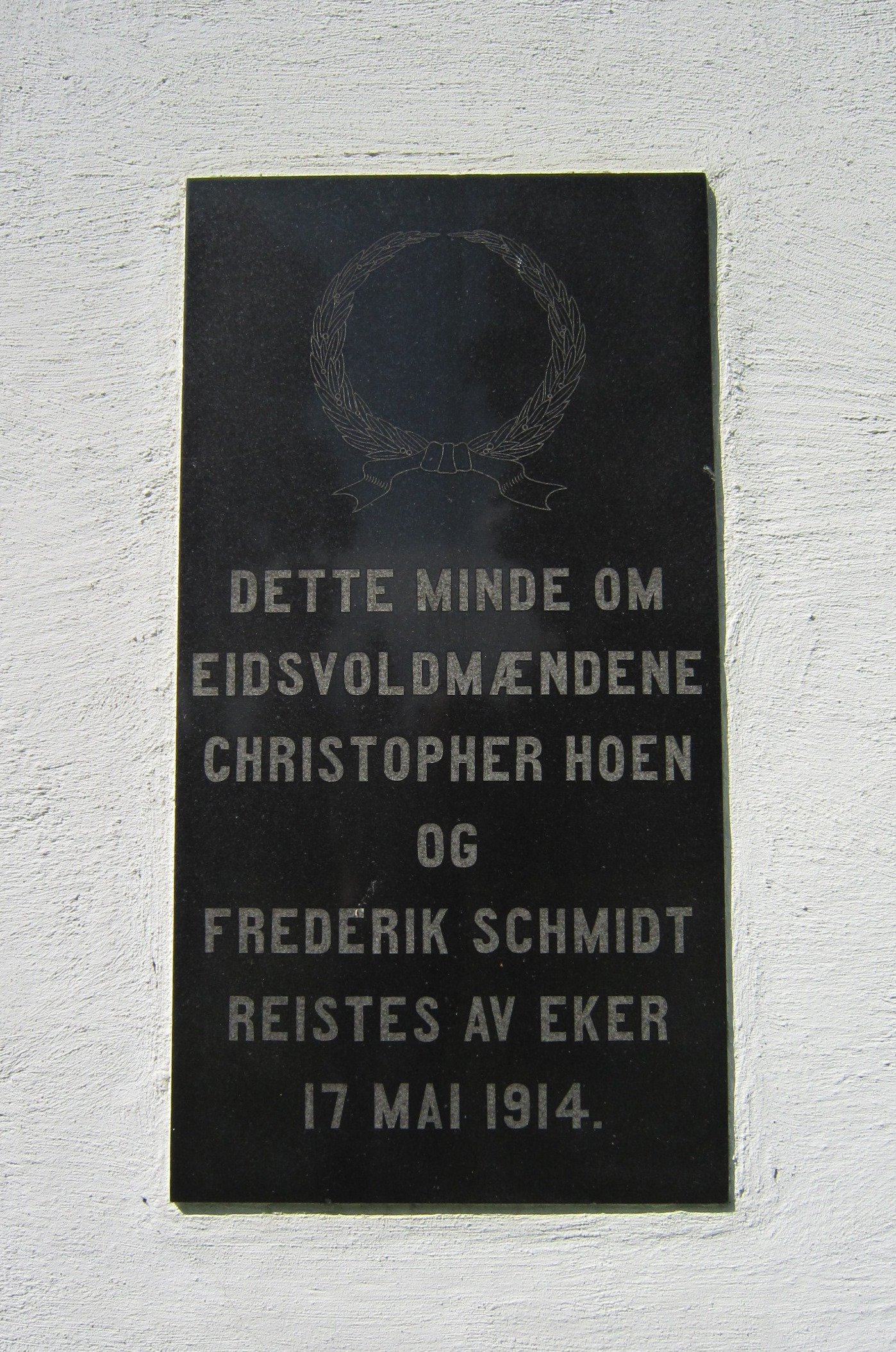 Minnesmerke over eidsvollsmennene Christopher hoen og Frederik Schmidt på Haug kirke ved Hokksund (Øvre Eiker)